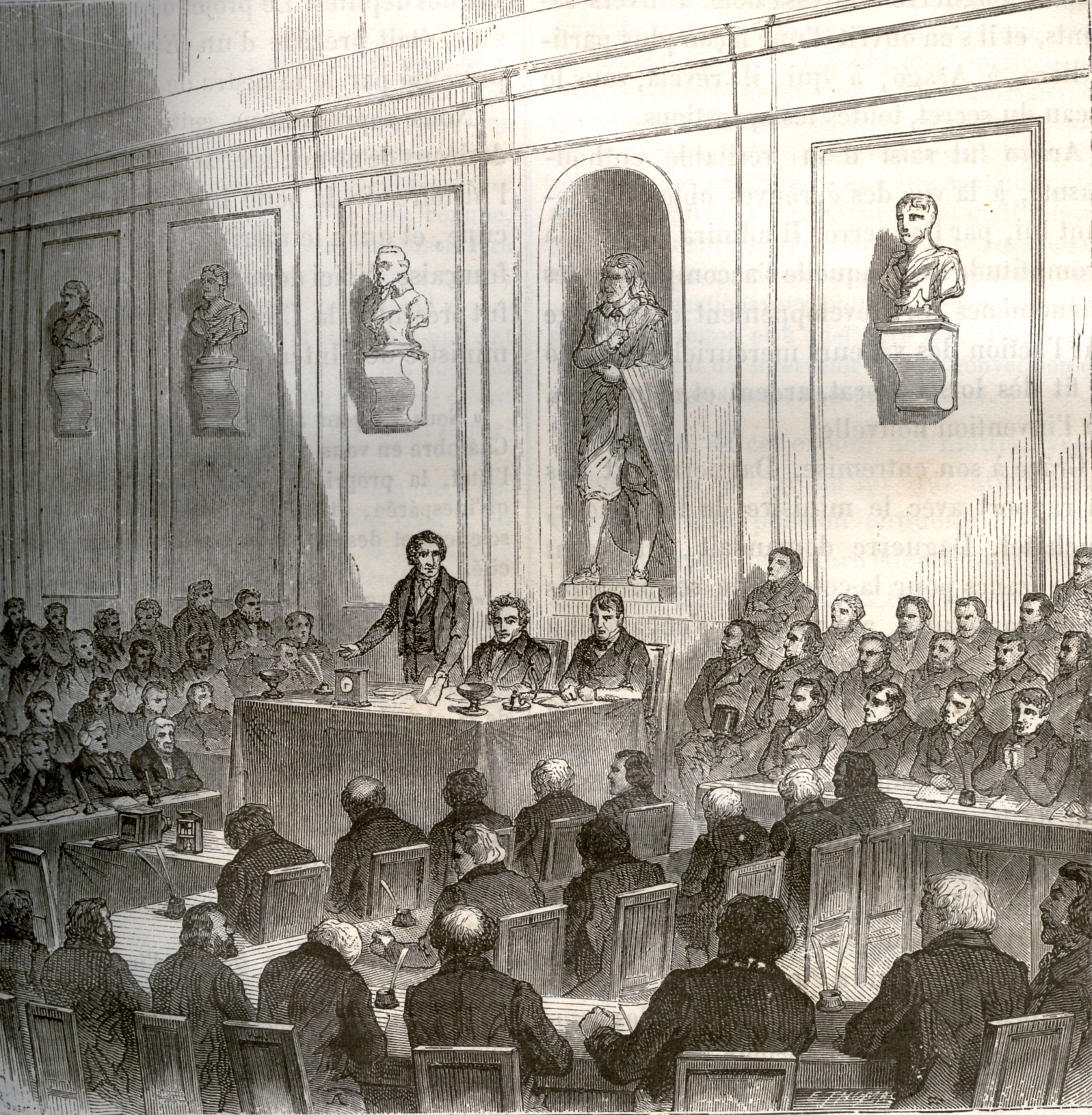 "Arago anuncia el descubrimiento de Daguerre, en la sesion pública de la Academia de Ciencias del 19 de agosto de 1939". Ilustración de Yan' Dargent aparecida en el libro de Louis Figuier "Les Merveilles de la science ou description populaire des inventions modernes", volúmen III de 1867, página 41.